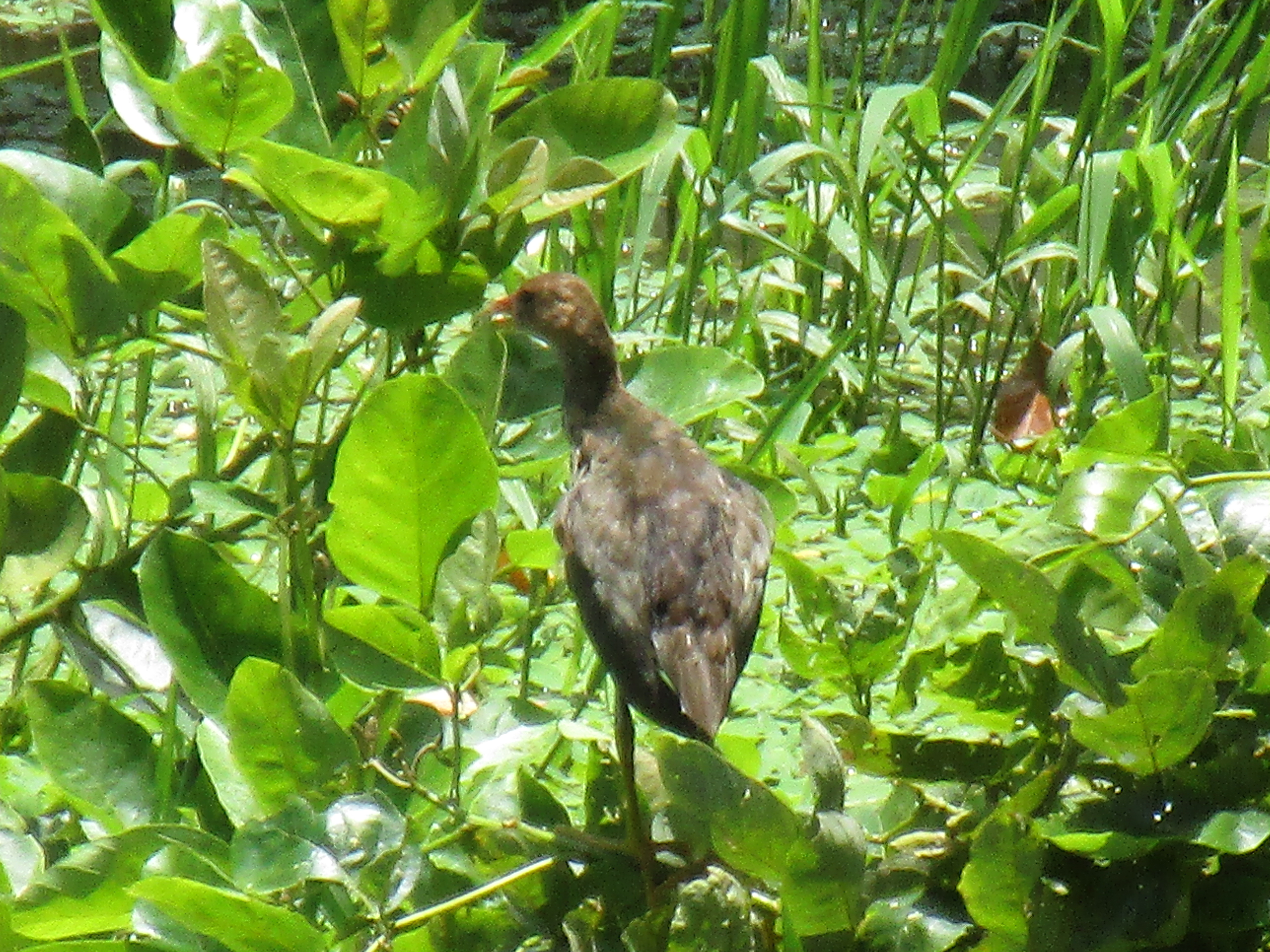 Ave en las afueras de Nauta cerca a la reserva Pacaya Samiria